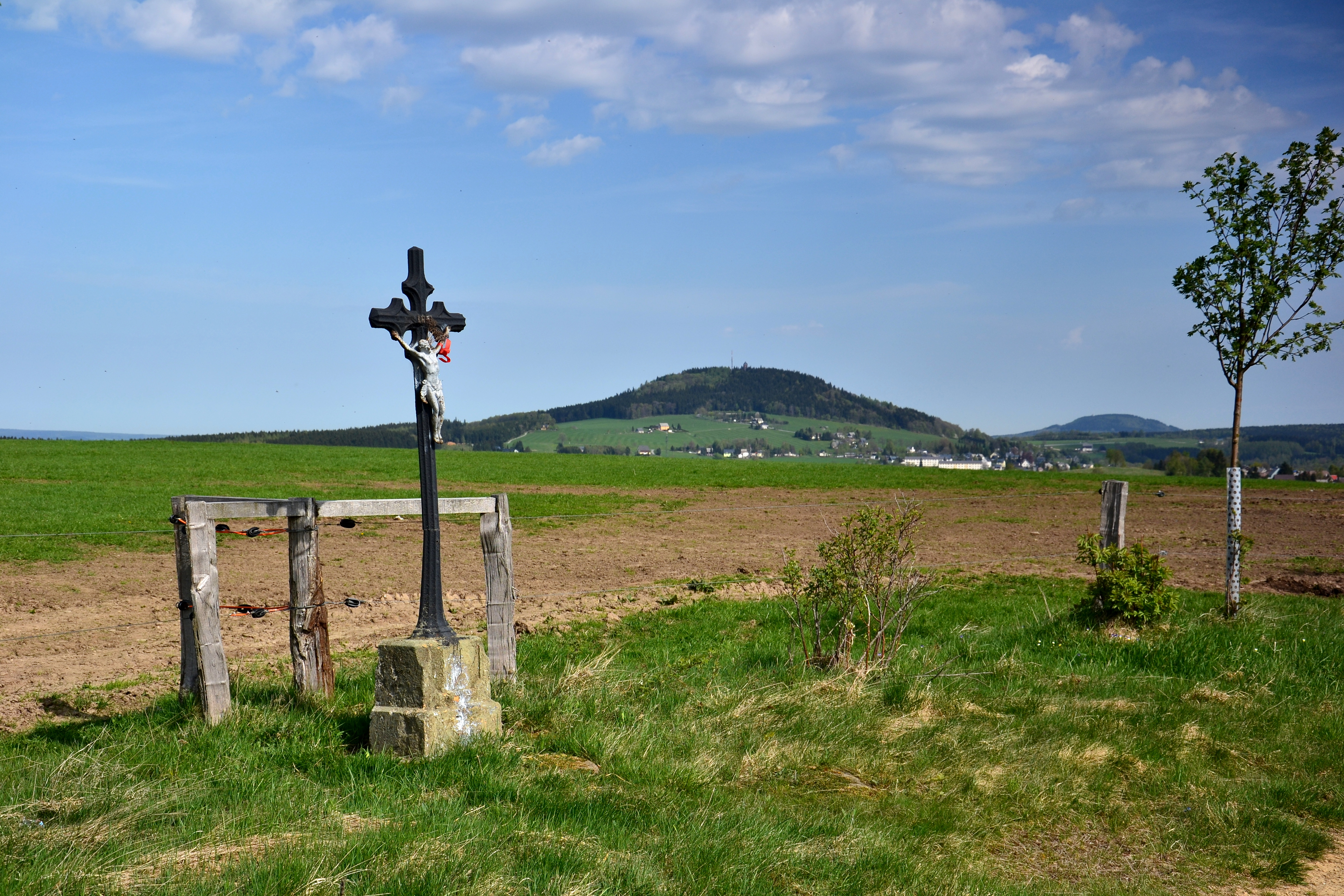 Kříž na vrchu Nad Vodárnou u cesty z Nového Zvolání do Vejprt